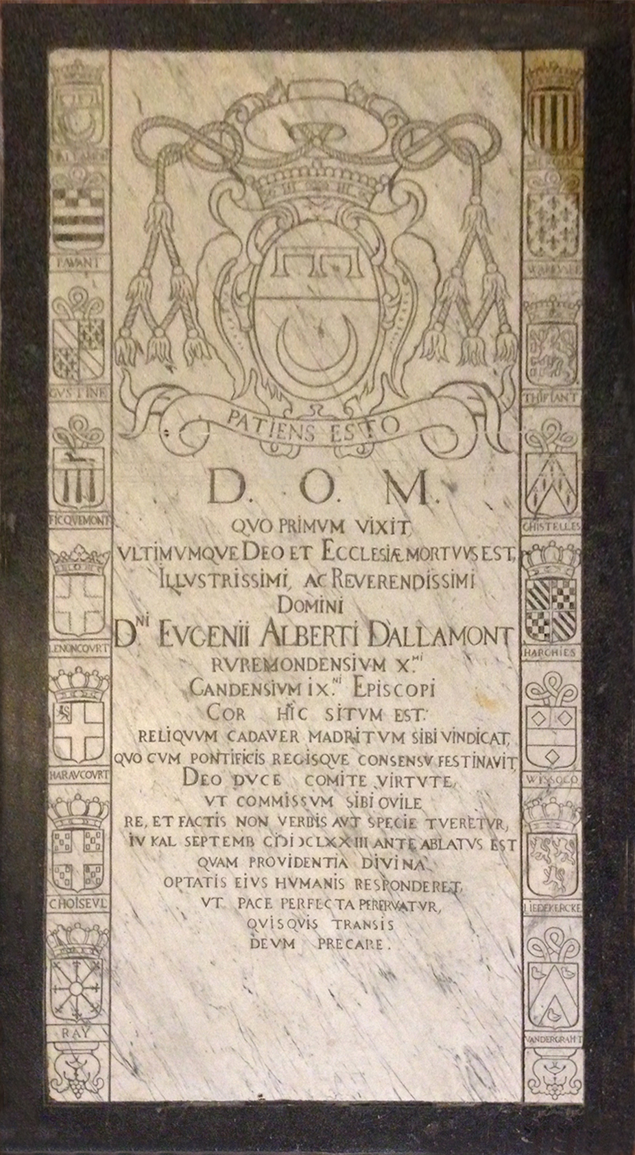 Grafplaat bisschop Eugenius Albertus d'Allamont in de crypte van de Sint-Baafskathedraal te Gent